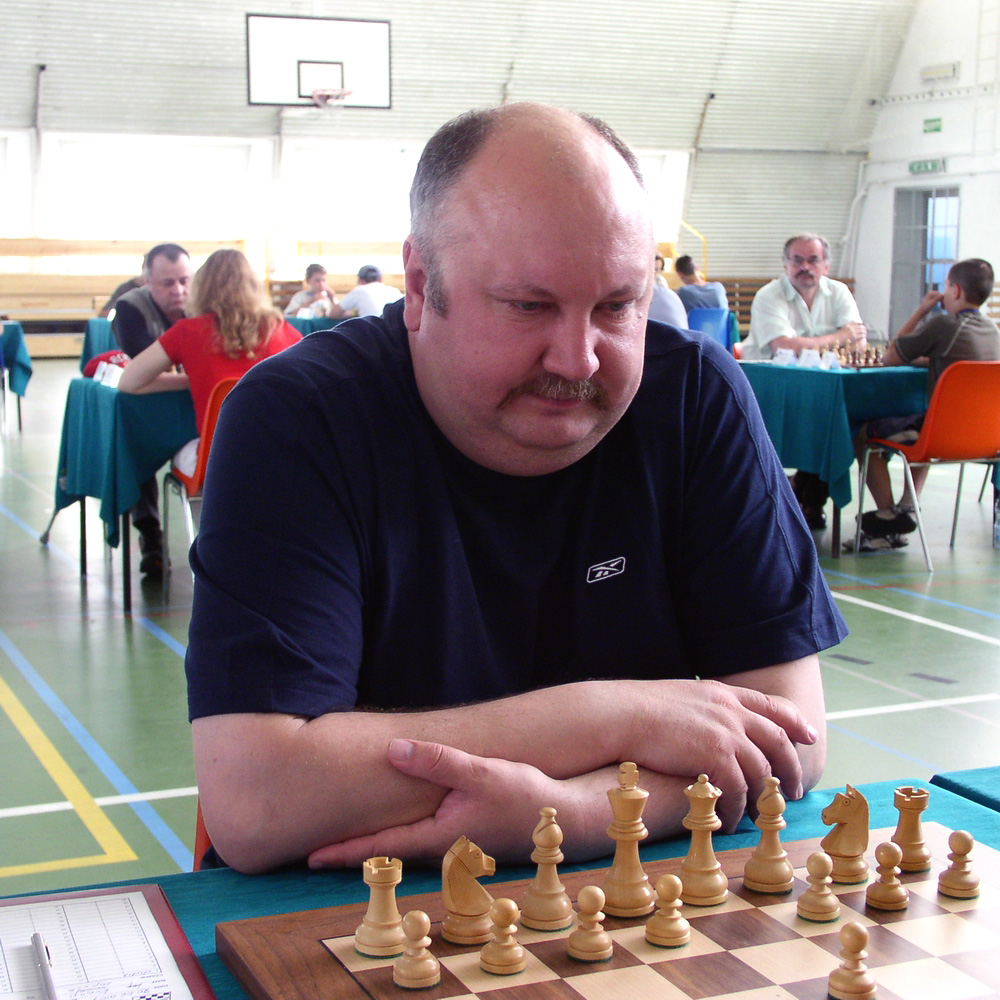 GM Aloyzas Kveinys, Mielno 2007